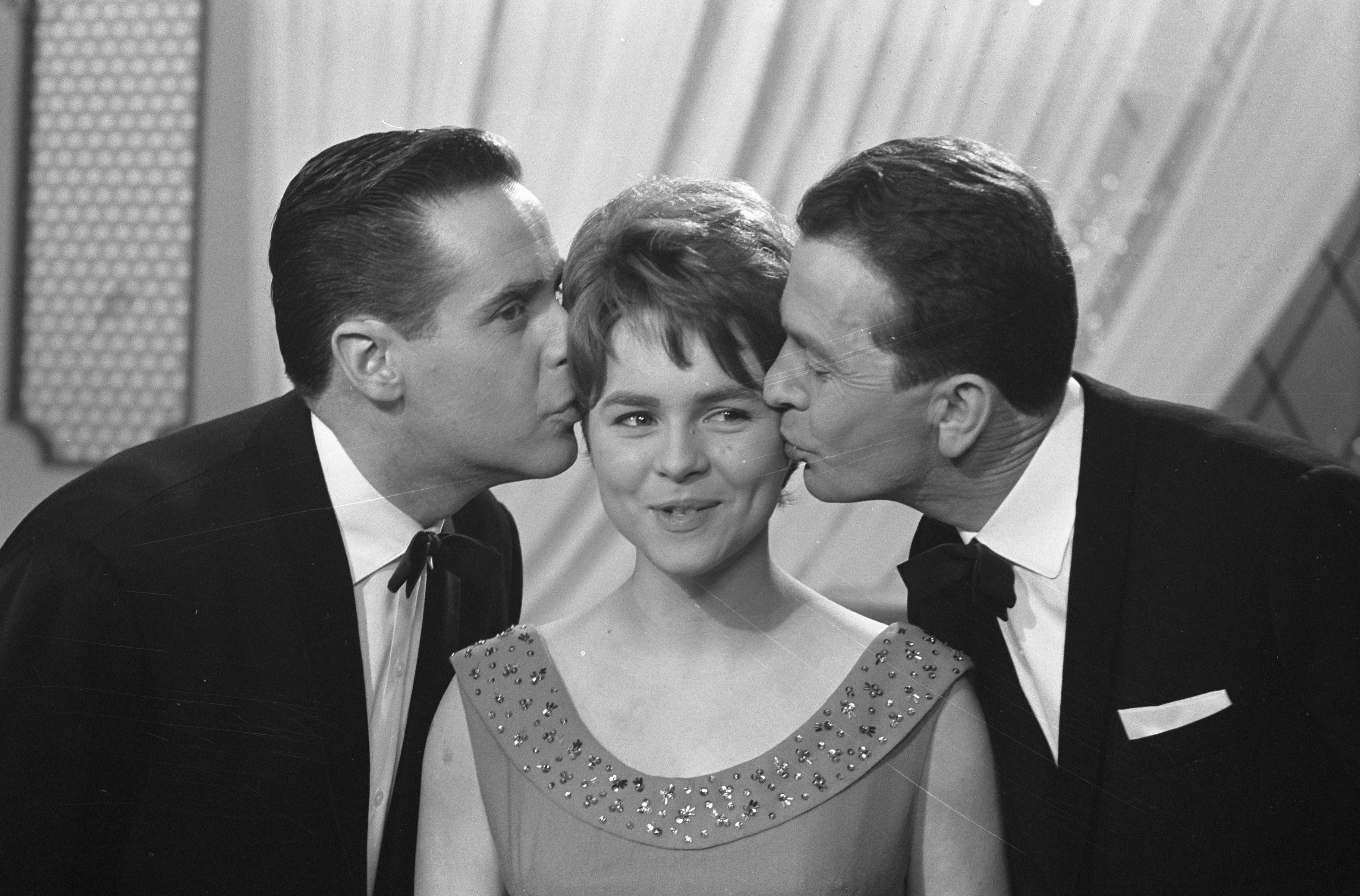 Collectie / Archief : Fotocollectie Anefo Reportage / Serie : [ onbekend ] Beschrijving : Eurovisie Songfestival 1962 te Luxemburg, De Spelbrekers met Conny Froboes Datum : 18 maart 1962 Locatie : Luxemburg Trefwoorden : artiesten, songfestivals Persoonsnaam : Froboes Conny Instellingsnaam : Spelbrekers Fotograaf : Pot, Harry / Anefo Auteursrechthebbende : Nationaal Archief Materiaalsoort : Negatief (zwart/wit) Nummer archiefinventaris : bekijk toegang 2.24.01.05 Bestanddeelnummer : 913-6615 Reacties Geplaatst door Maaike op 19 juli 2012 - 20:50. Persoonsnamen: Theo Rekkers en Huug Kok